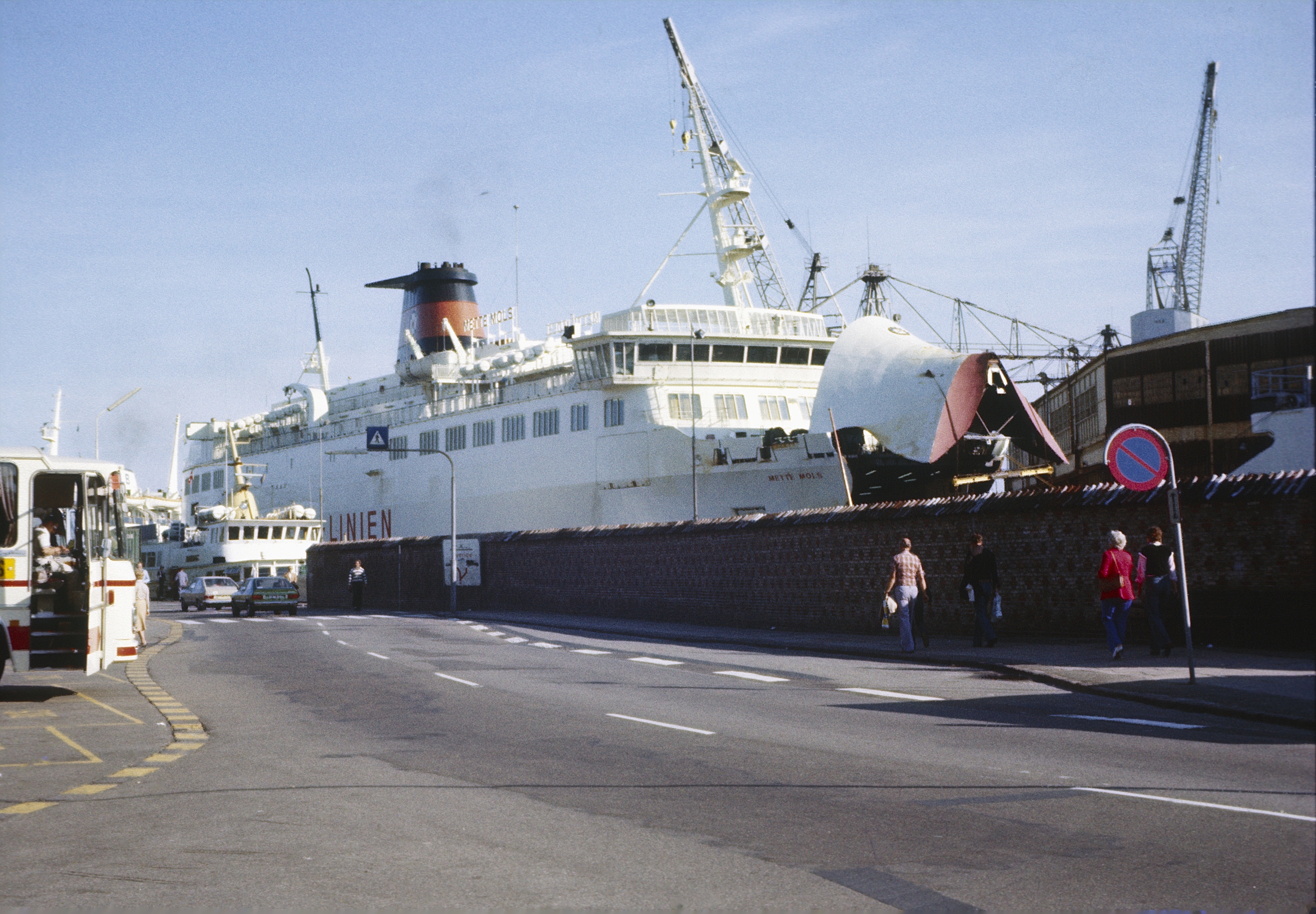 Helsingor am Hafen